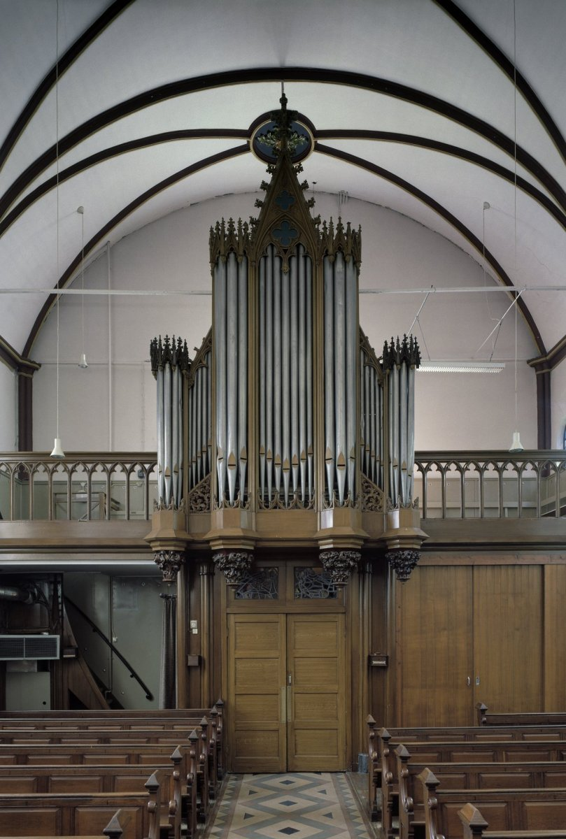 Rooms-katholieke kerk Heilige Maria Geboorte: Interieur, aanzicht orgel, orgelnummer 1307 (opmerking: Gefotografeerd voor Het Historische Orgel in Nederland 1858-1865)